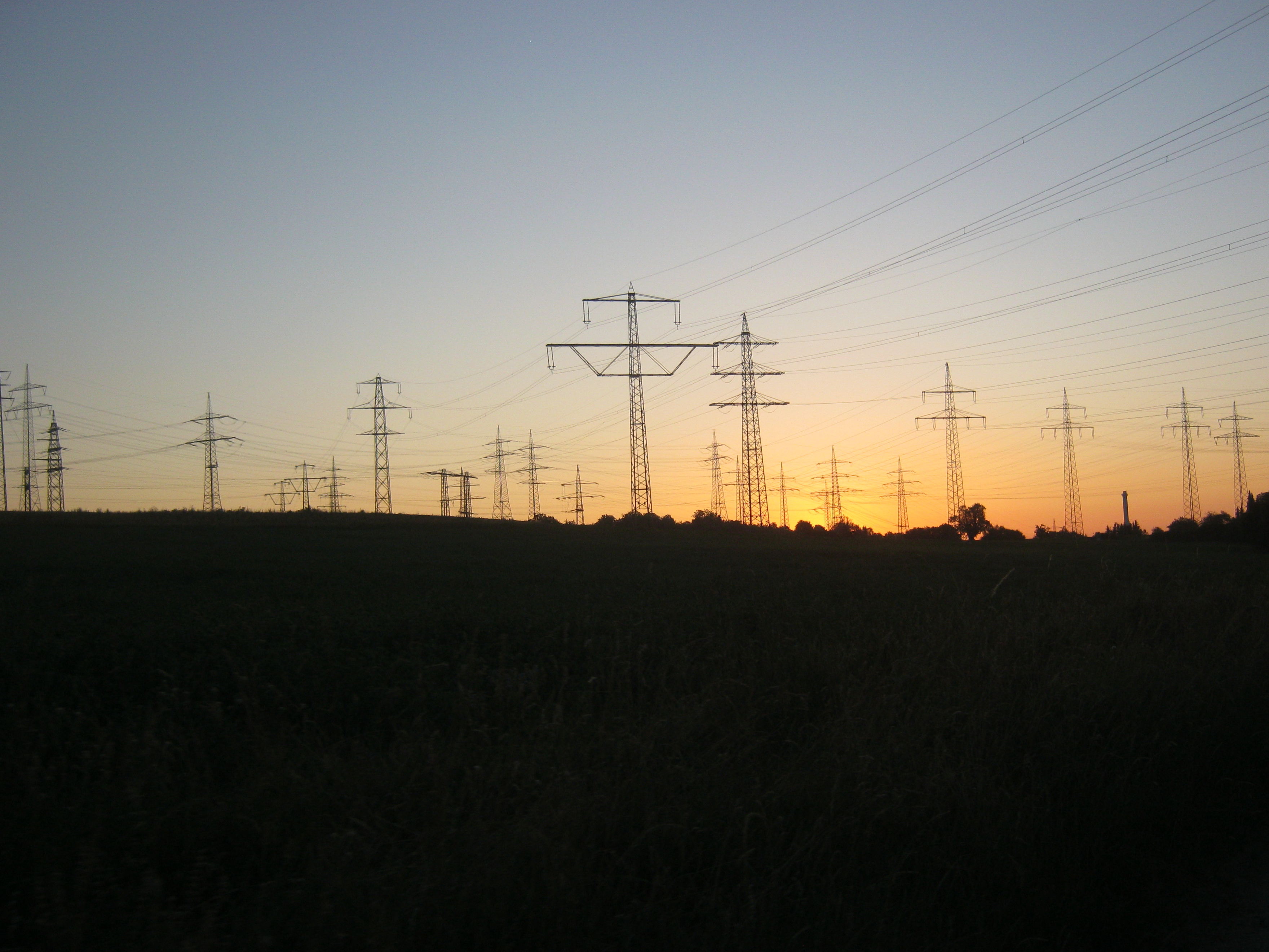 Hochspannungsleitungen beim Umspannwerk Hoheneck, Ludwigsburg